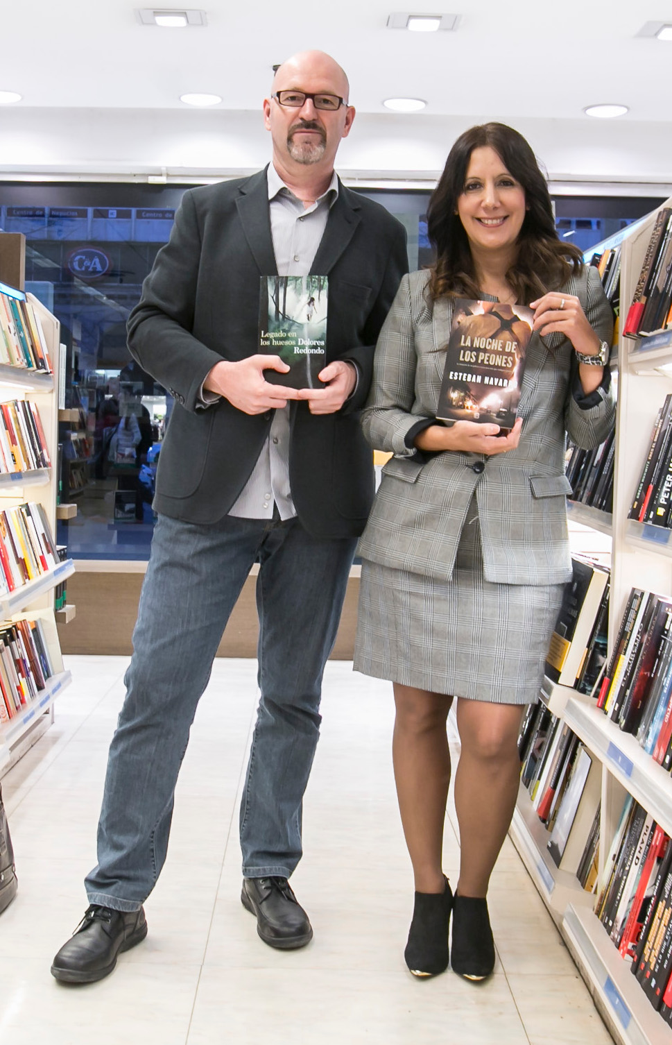 Dolores Redondo y el escritor Esteban Navarro en Zaragoza en marzo de 2014.